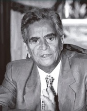 Ex-prefeito do Rio de Janeiro